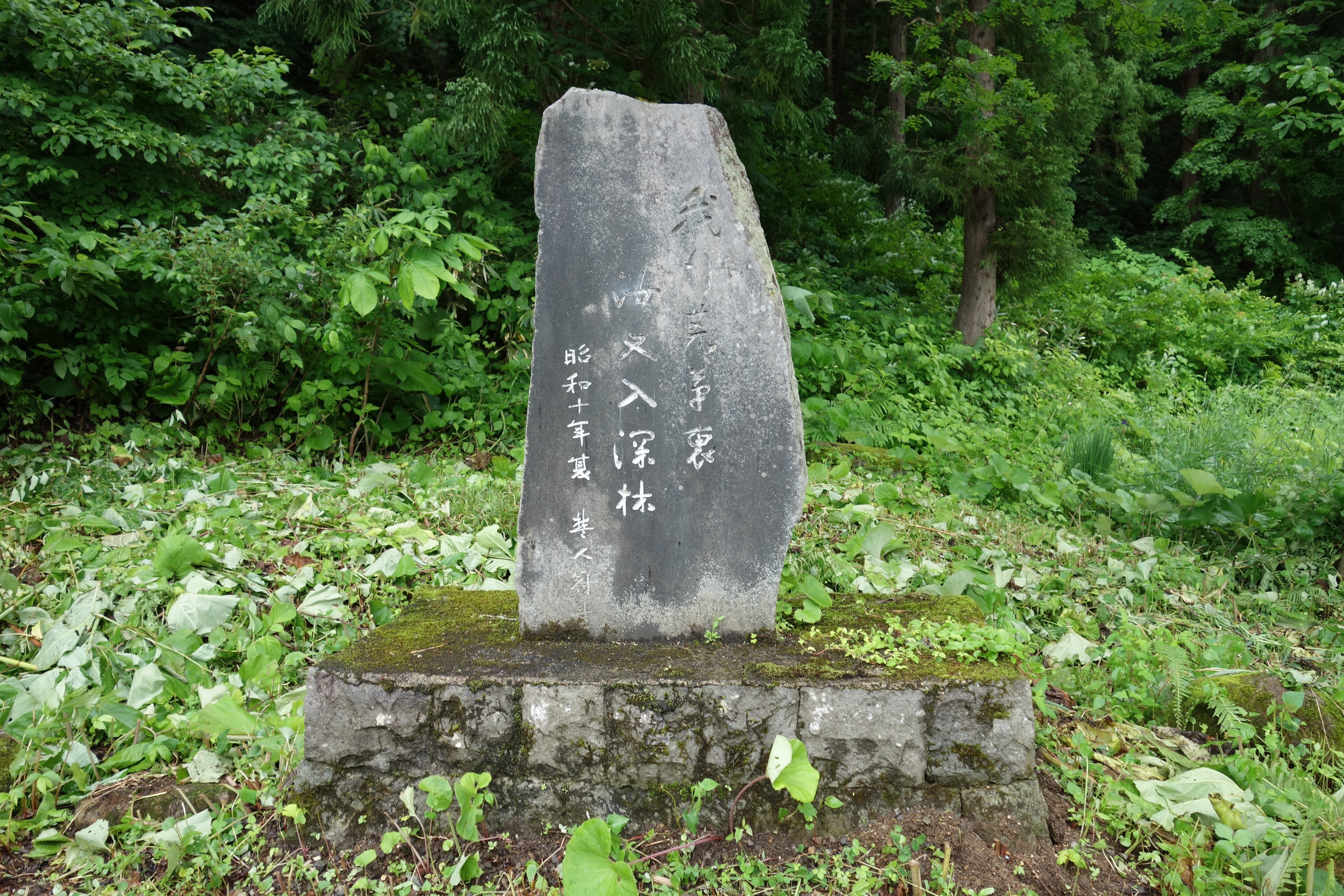 八幡平を全国に紹介する契機となった杉村楚人冠の落馬記念碑